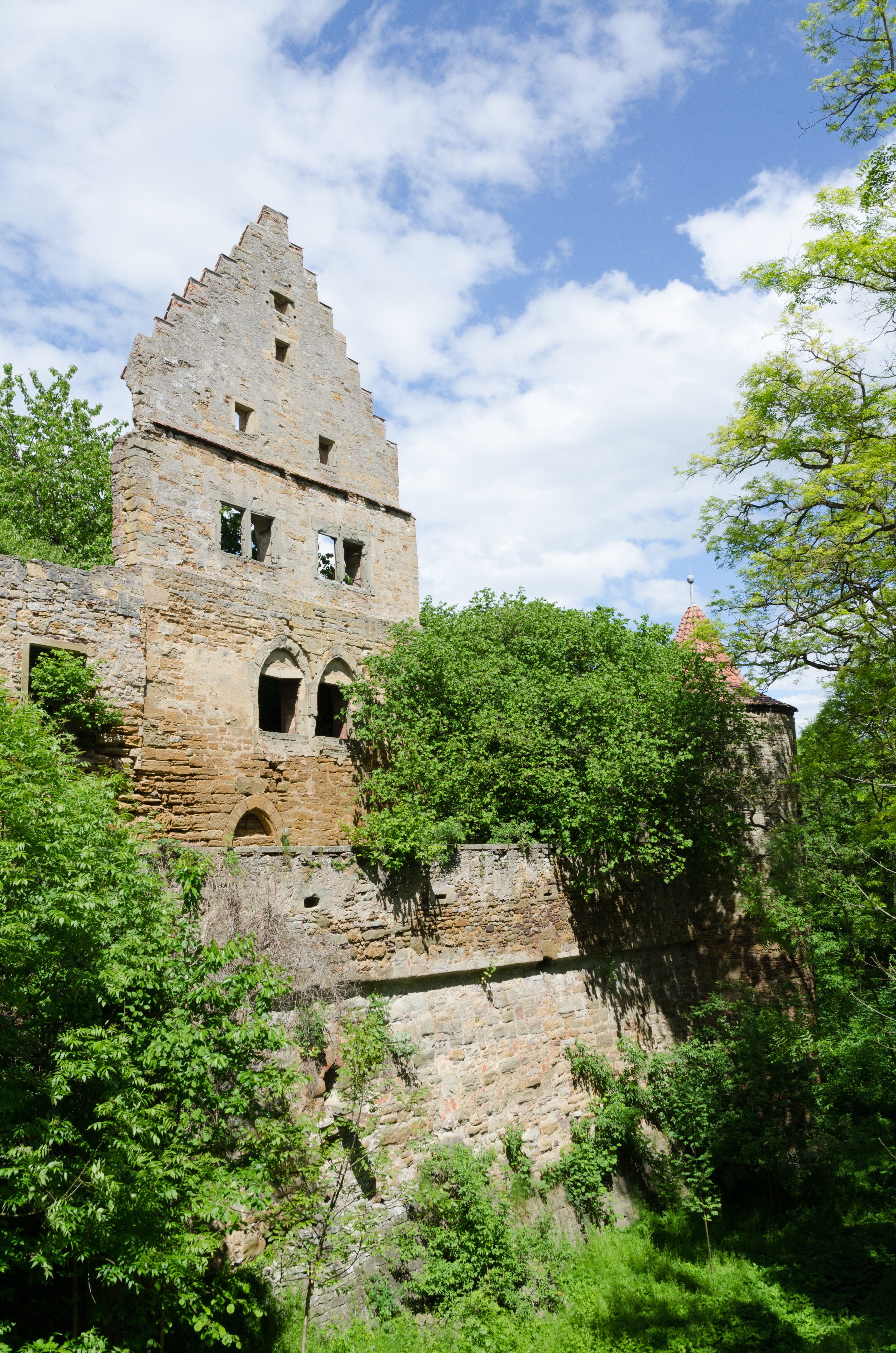 Wässerndorf, Schloßstraße 1